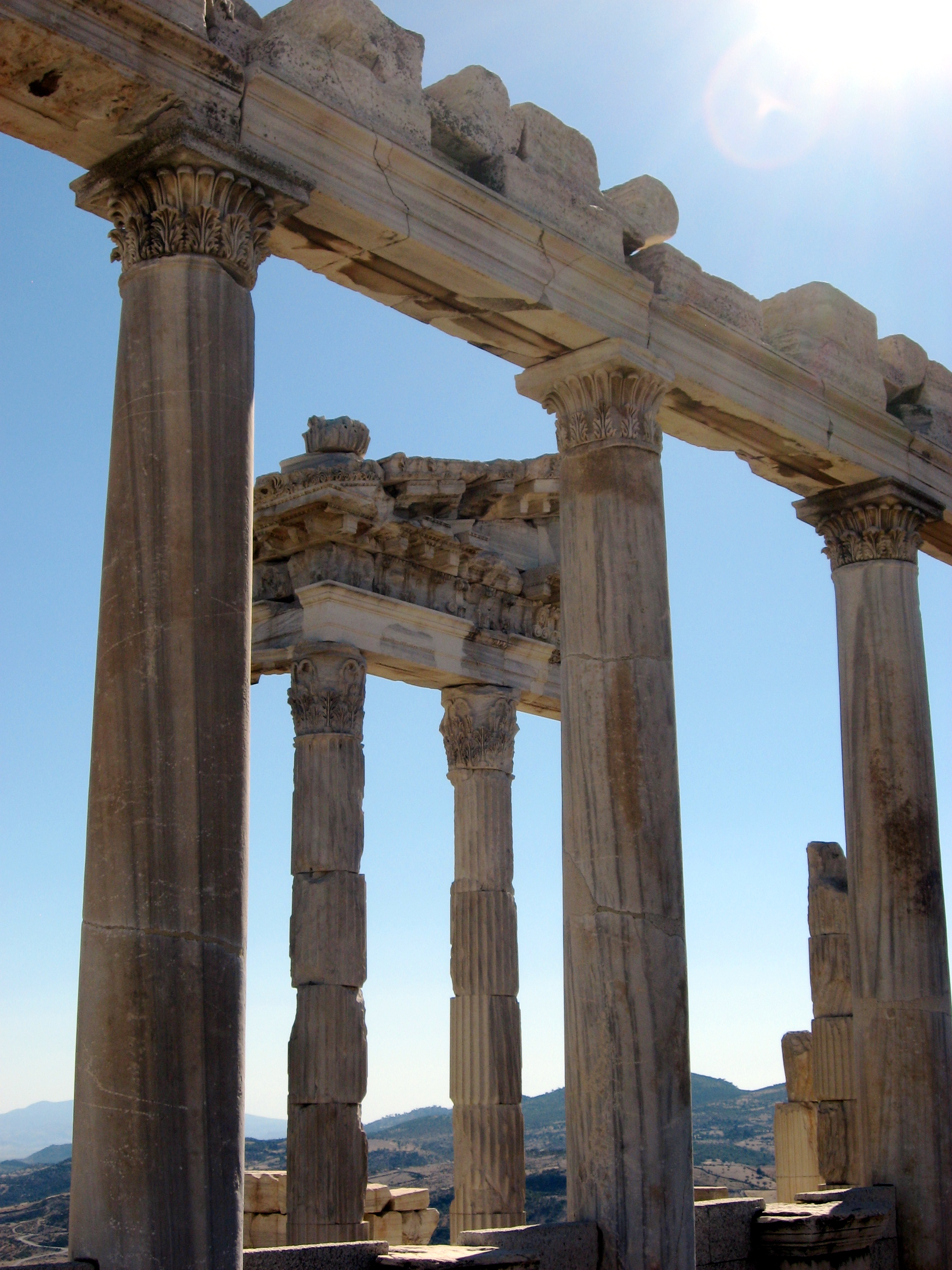 Pergamon